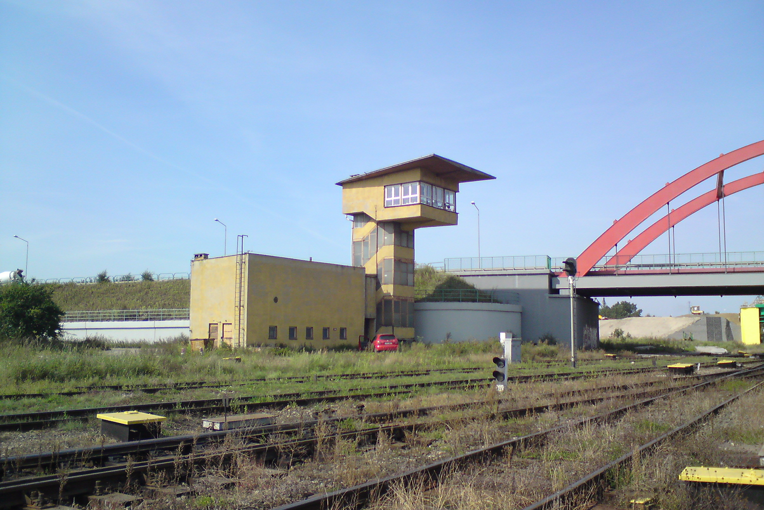 Gdańsk Przeróbka, nastawnia stacji w Gdańsku Porcie Północnym.